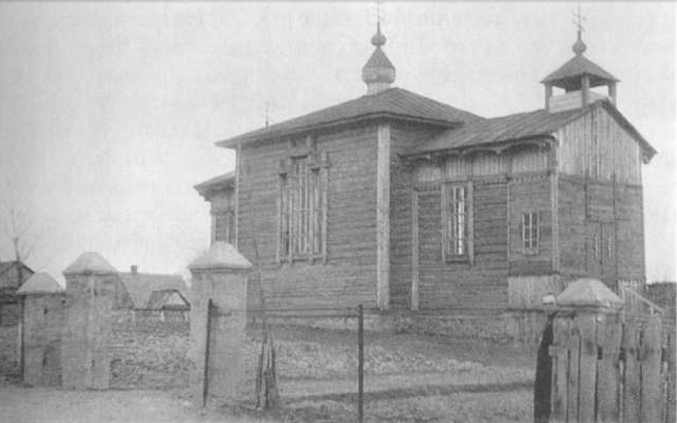 Беларуская (тарашкевіца): Менск (Miensk), Козырава (Kozyrava). Царква